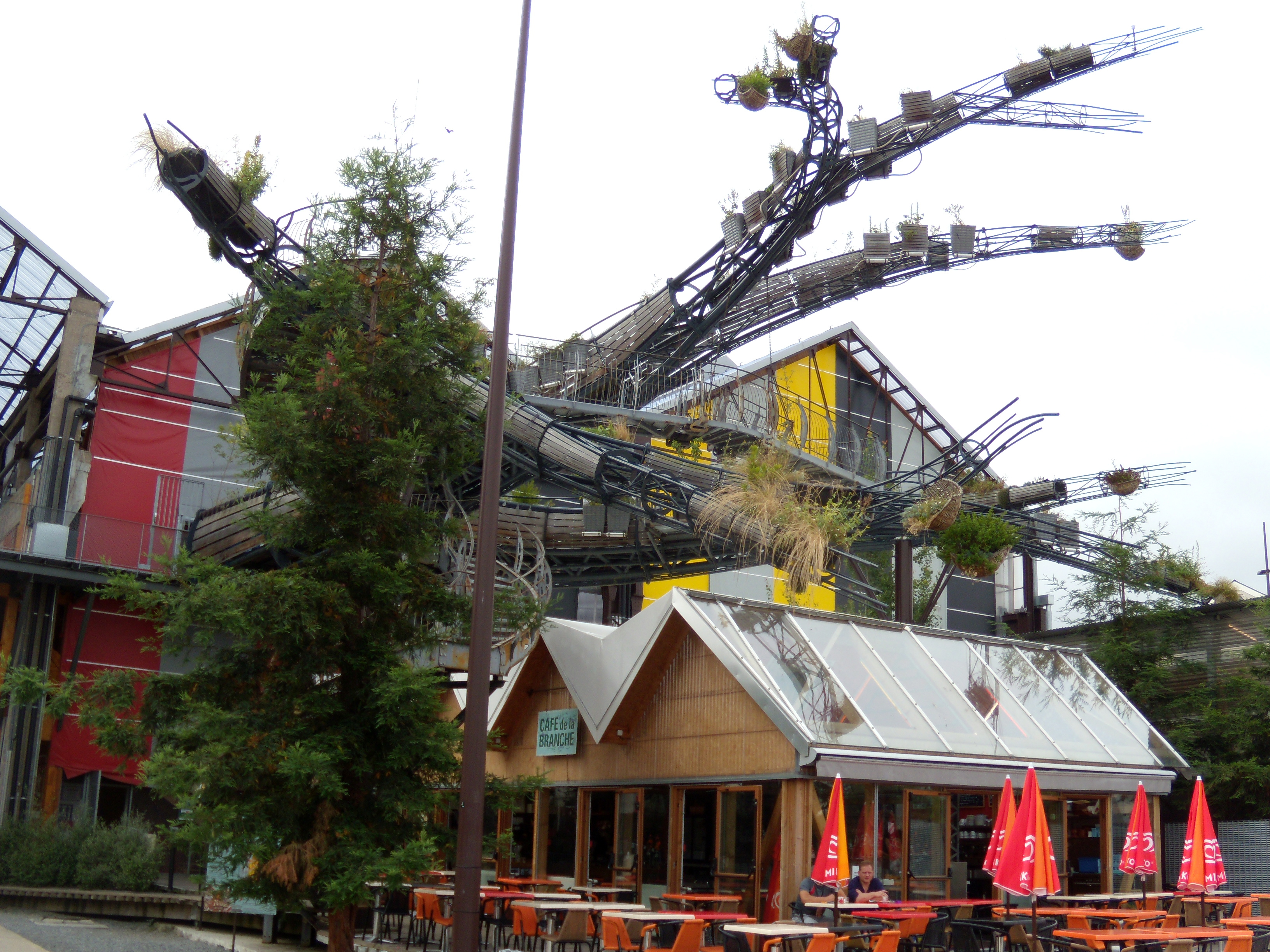 Branche prototype de l'Arbre aux Hérons des Machines de l'île de Nantes